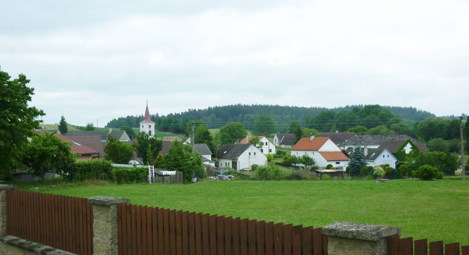 Pohled na vesnici